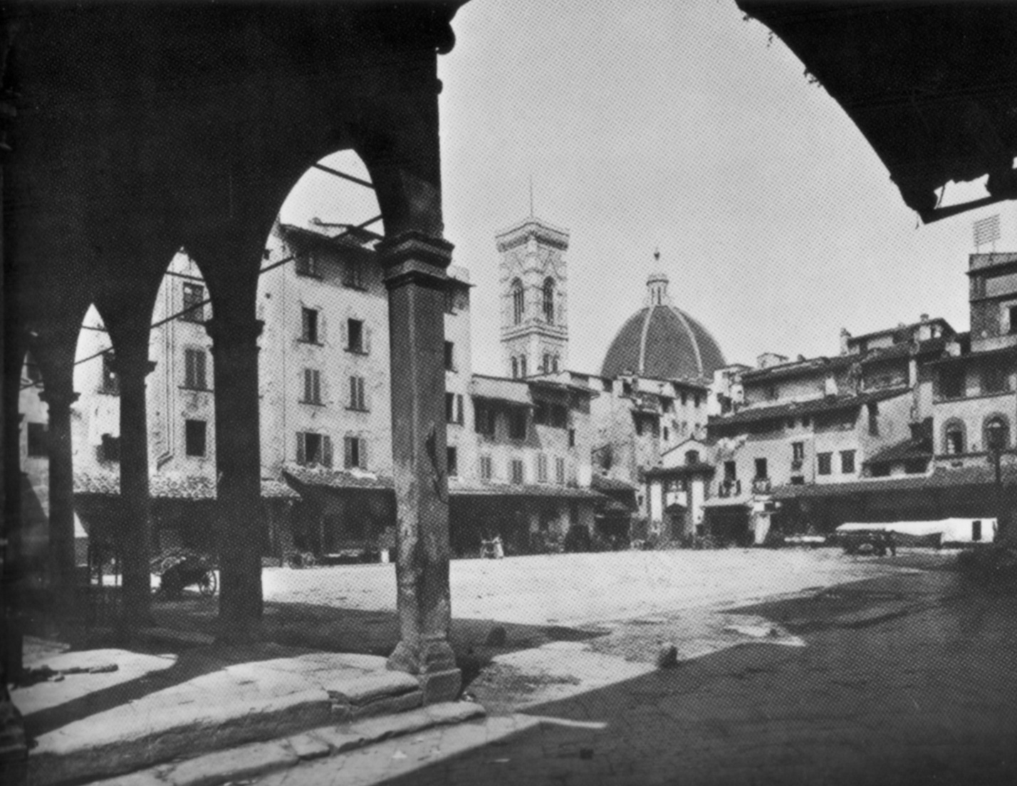 Piazza della repubblica in 1893